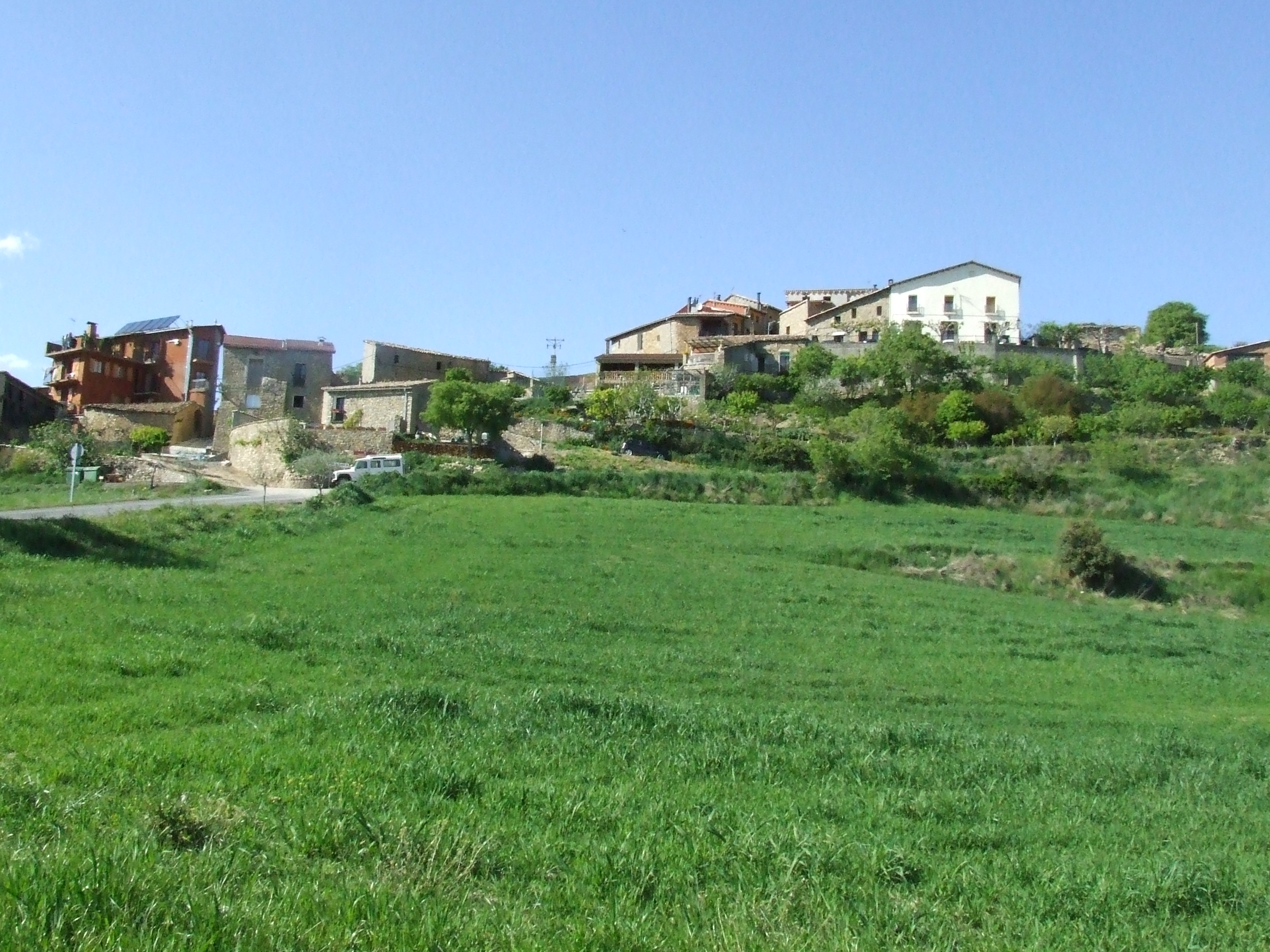 Vista general de Torallola (Toralla i Serradell, Conca de Dalt, Pallars Jussà)